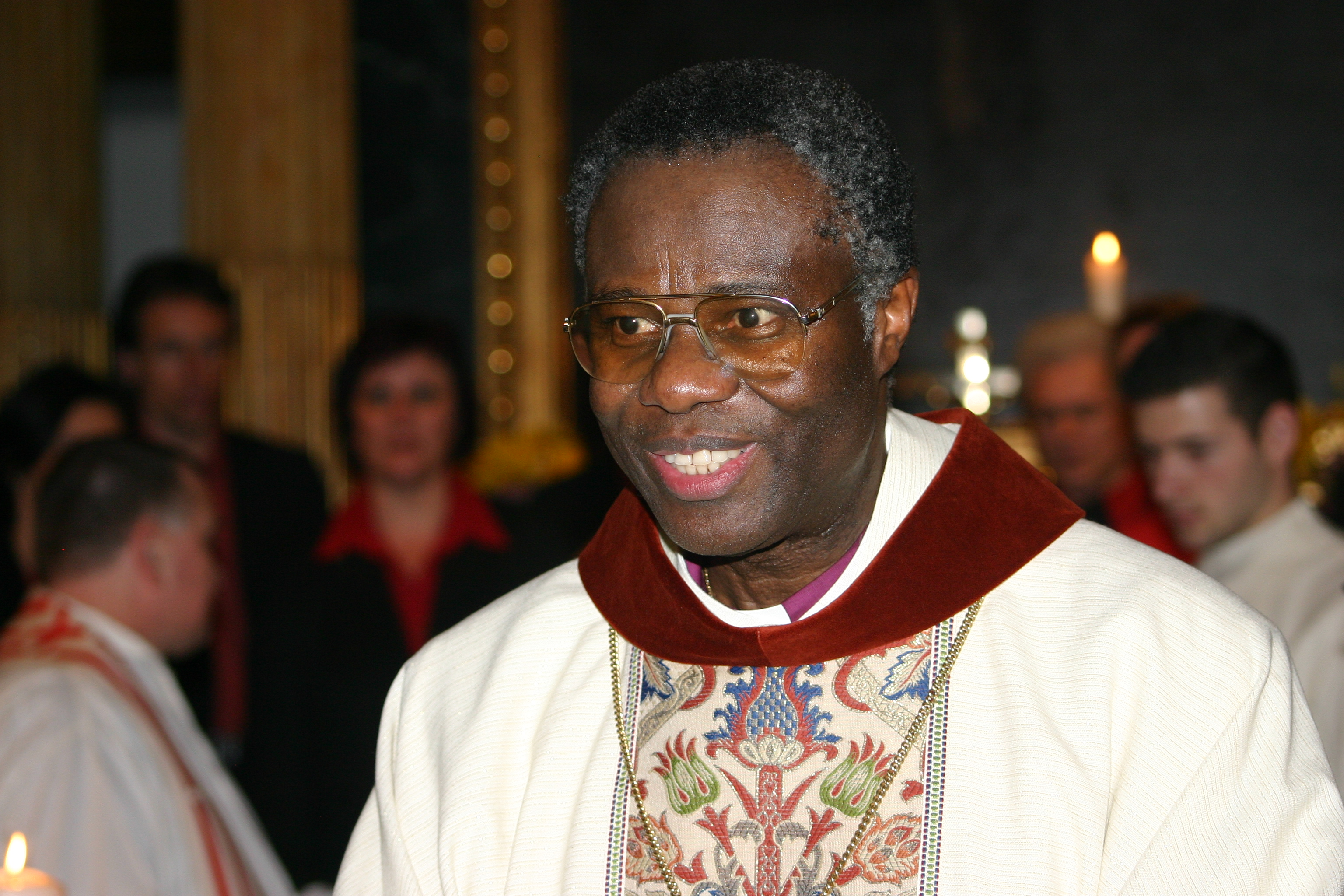 Bischof John Okoro - Altkatholische Kirche Österreich Weihe am 2.2.2008